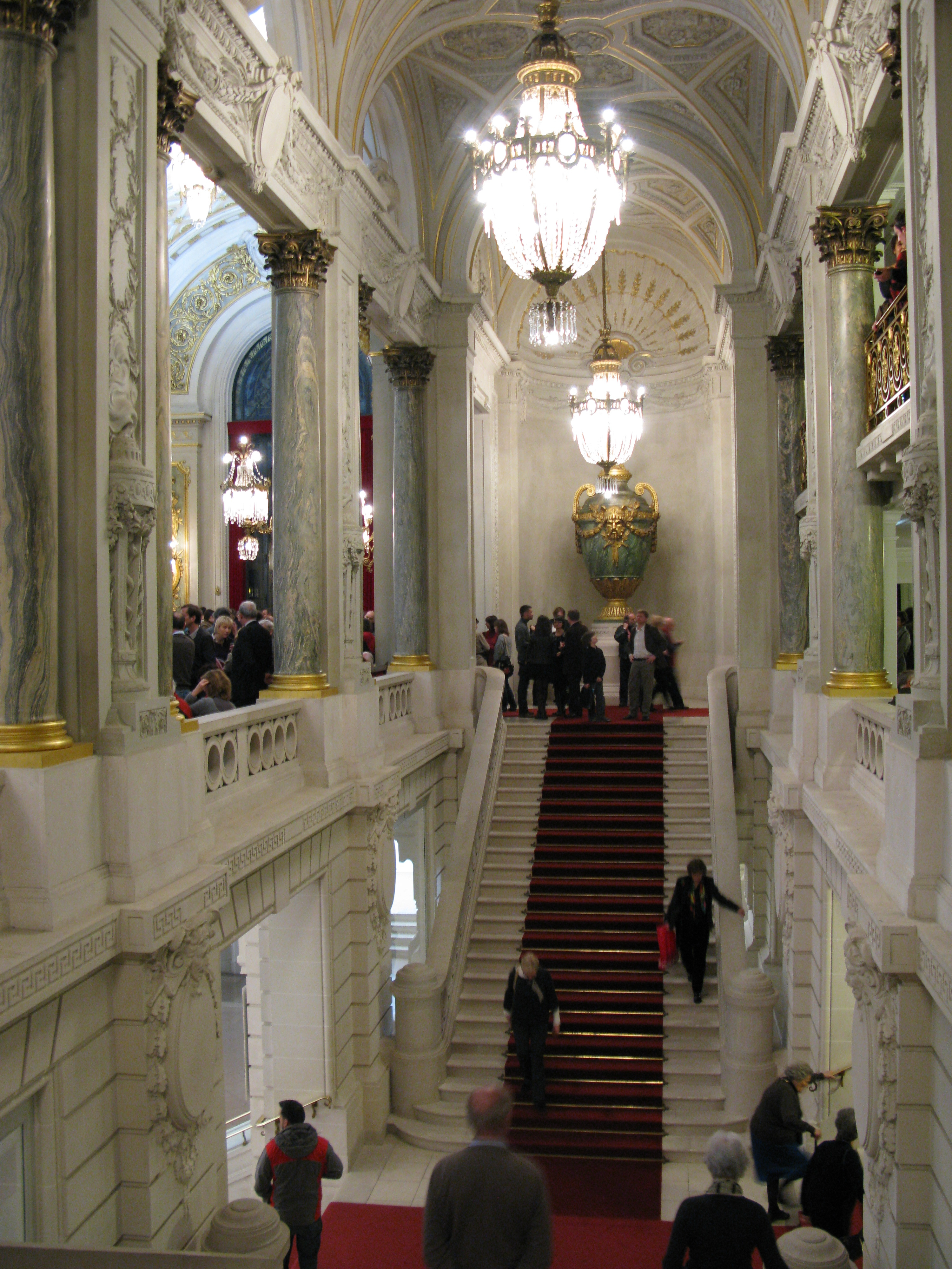 Intérieur de l'opéra de Lille